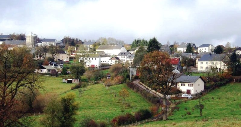 D'Dräilännerecksuertschaft Léiler.